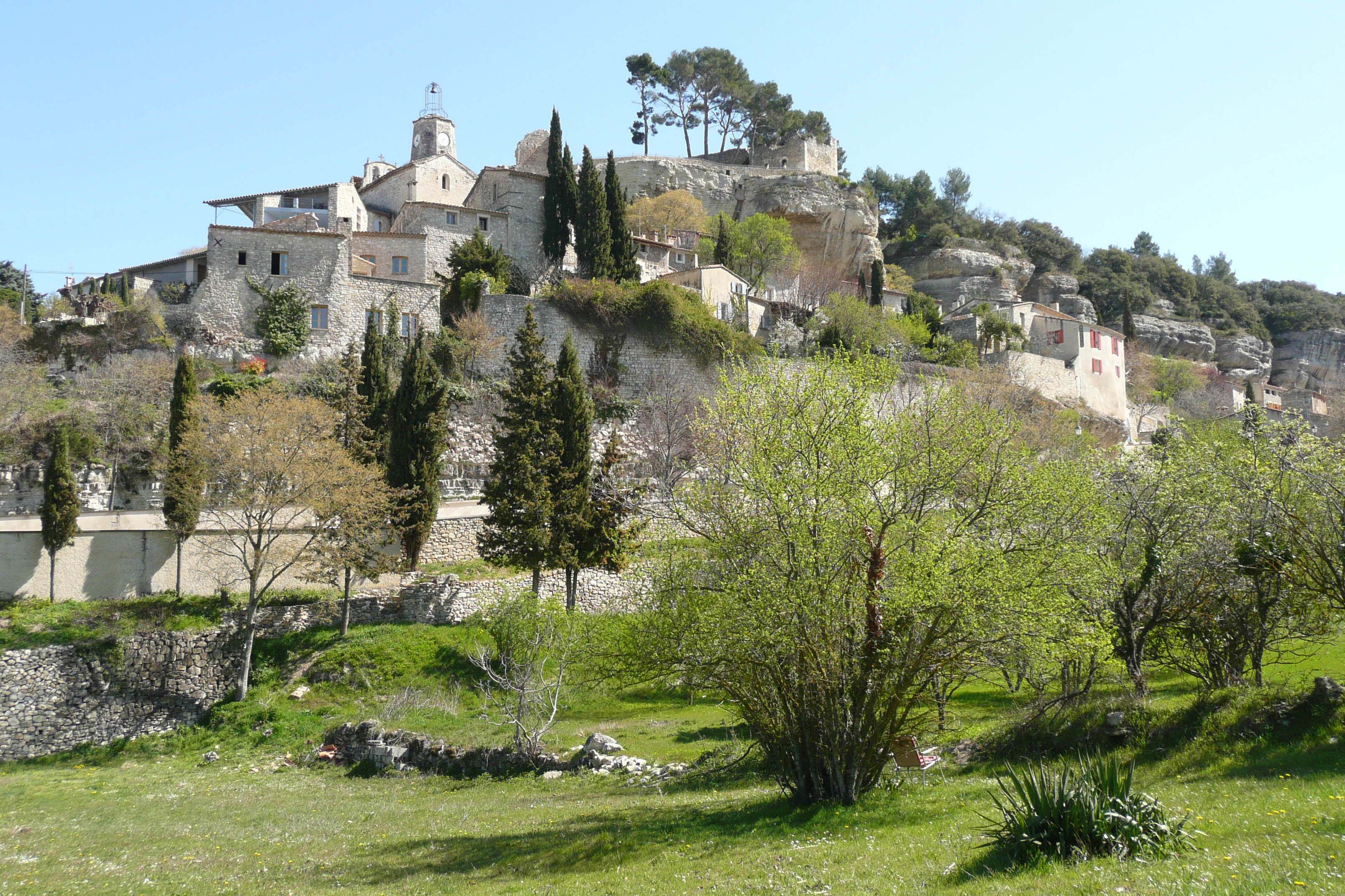 Vue sur le Beaucet.